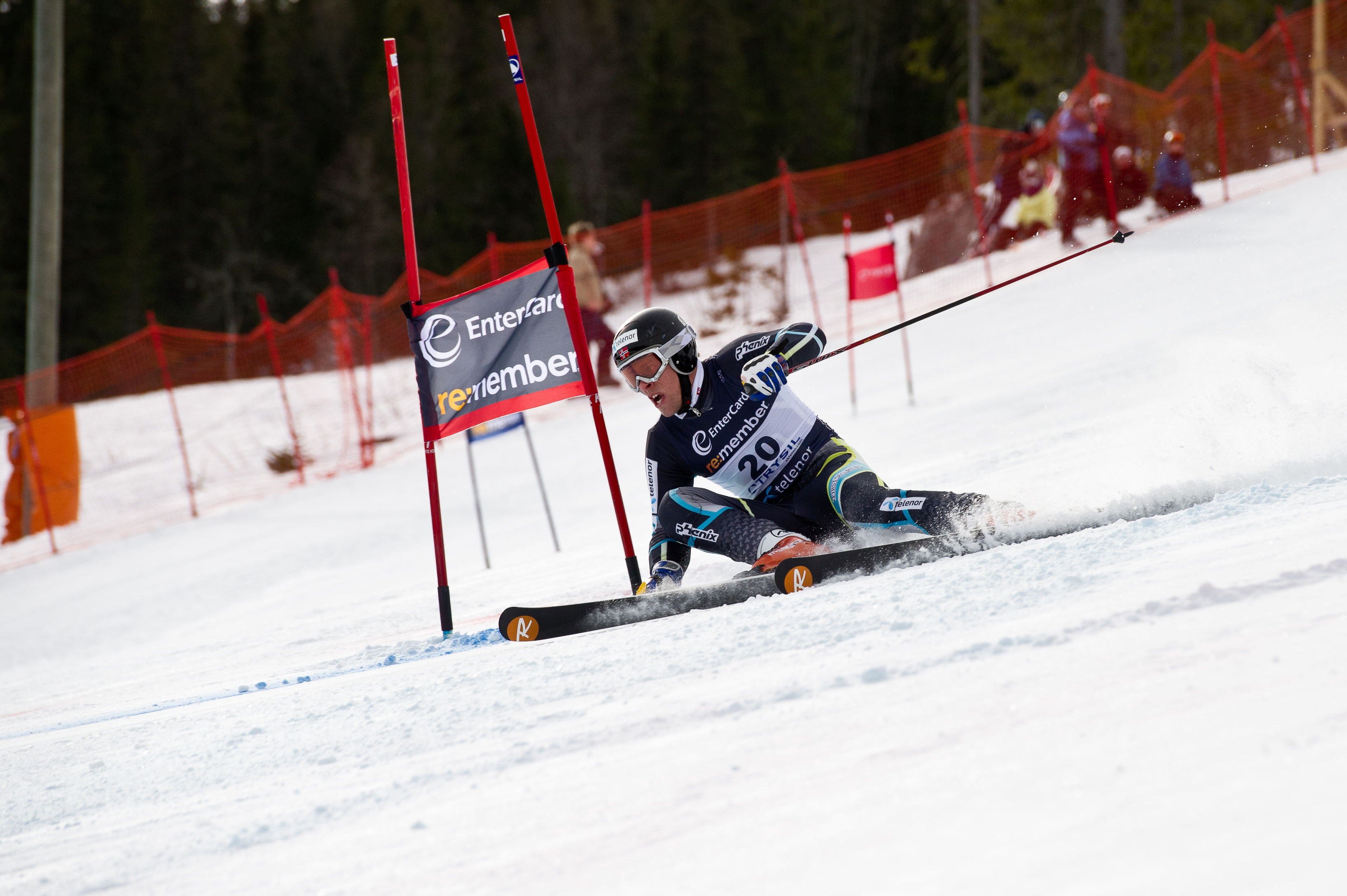 Nr. 4 Lars Elton Myhre - NM i storslalåm i Trysil 26. mars 2011.